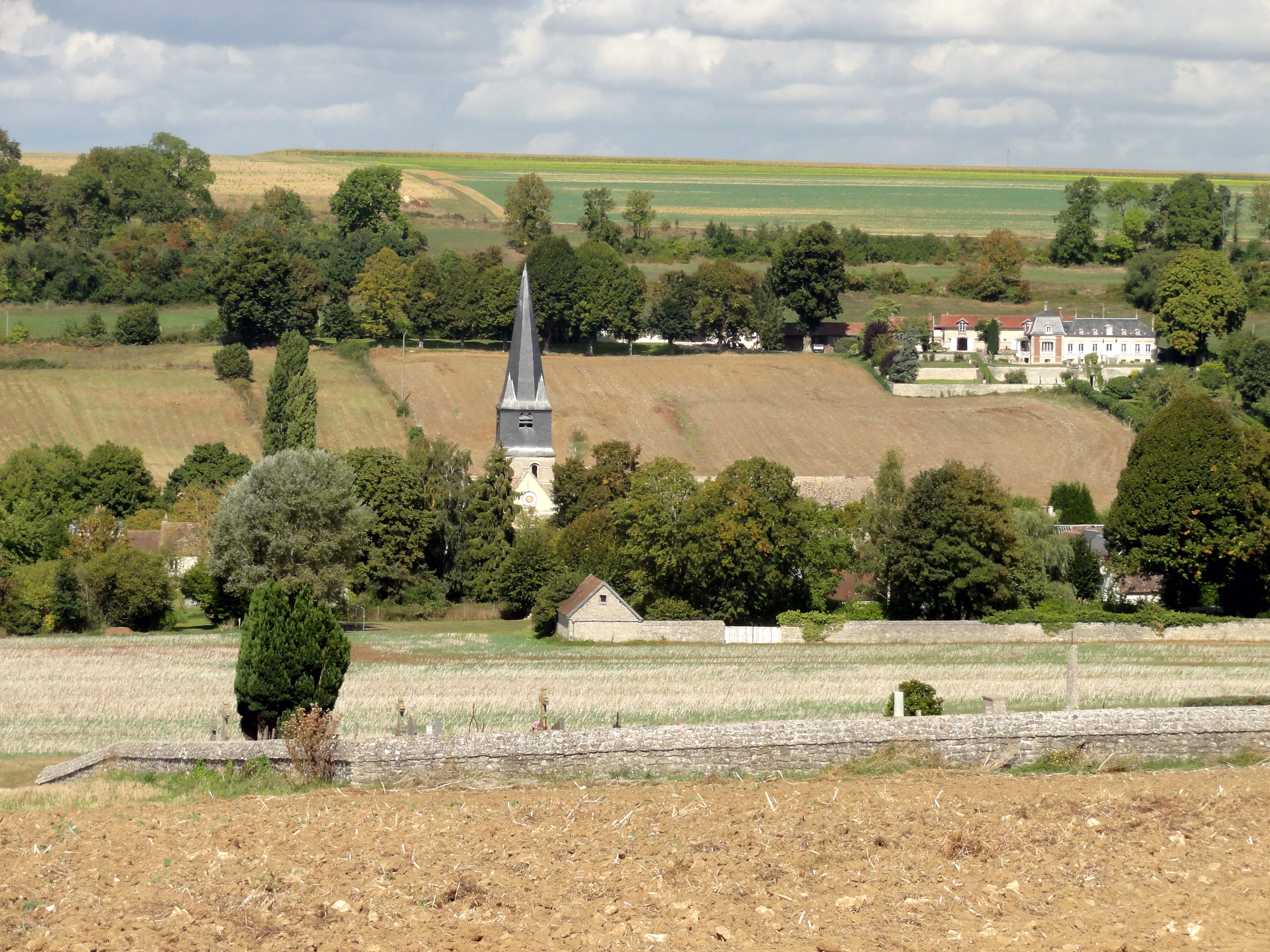 Eglise Saint-Josse, approche par l'est, au premier plan le mur du cimetière.